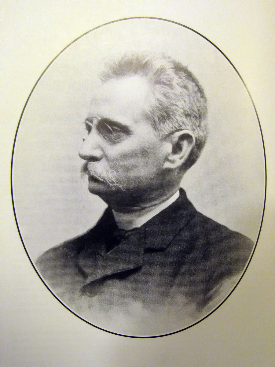 Retrat oficial de Lluís Domènech i Montaner de l'època que estava construint l'Hospital de Sant Pau (Barcelona).